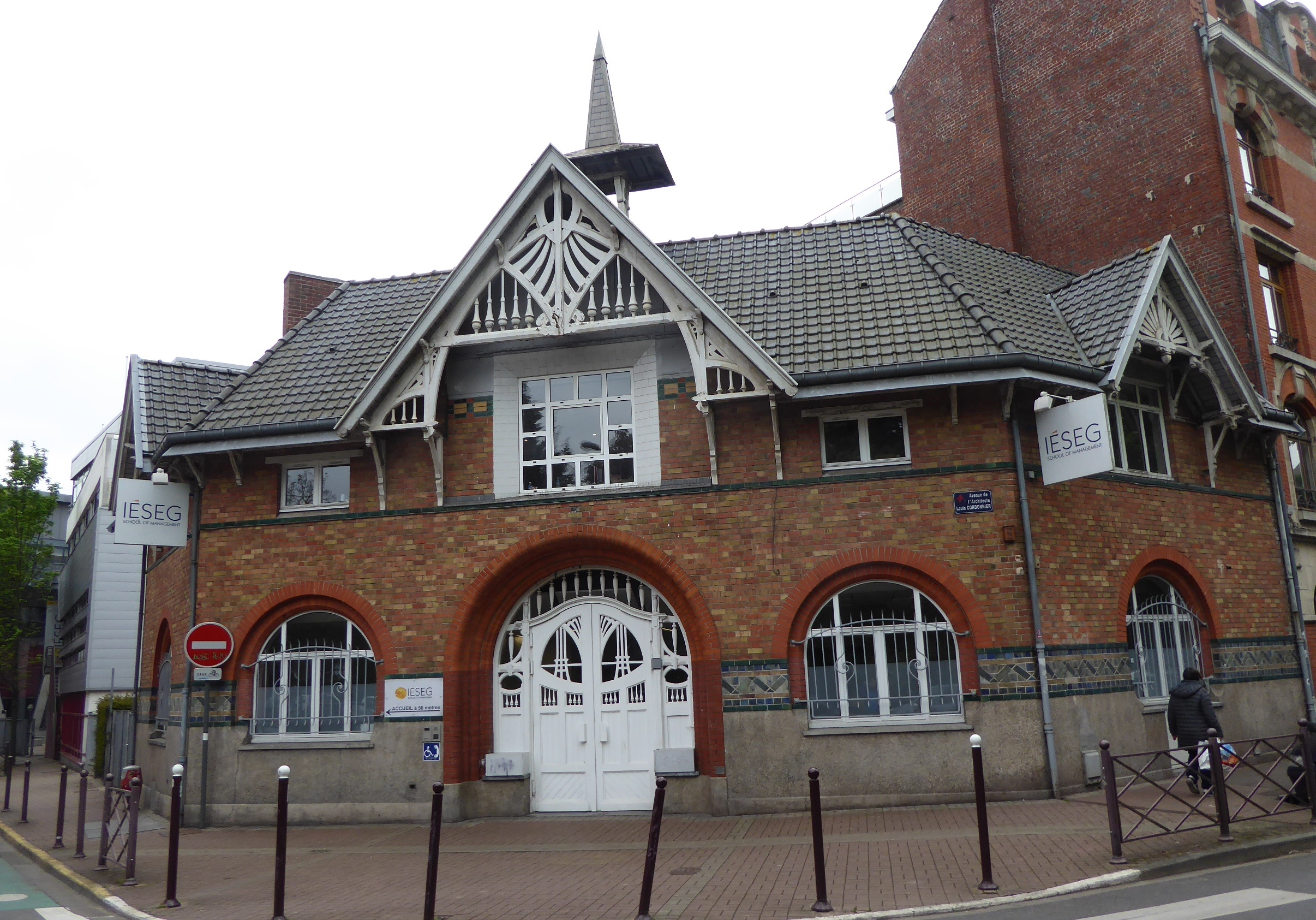 Façade de l'ancienne piscine ISEG